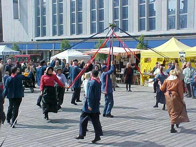 La Caracole